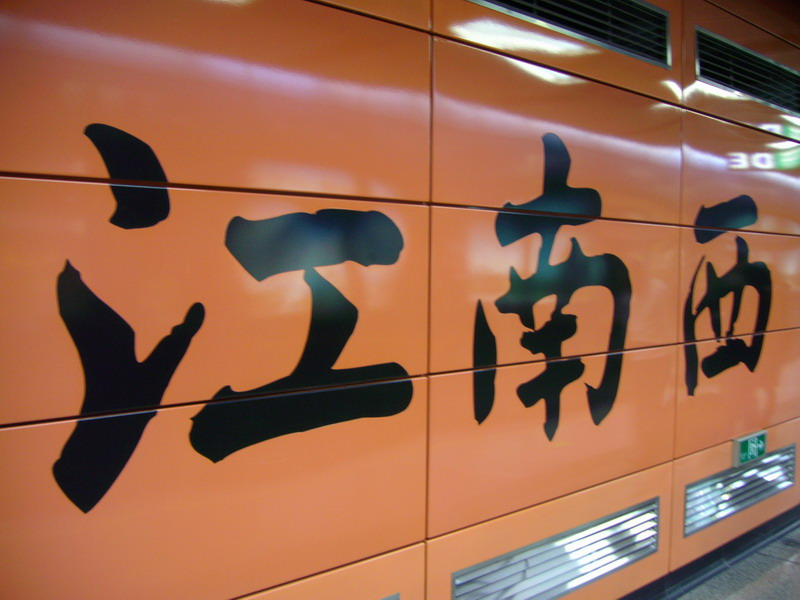 广州地铁江南西站